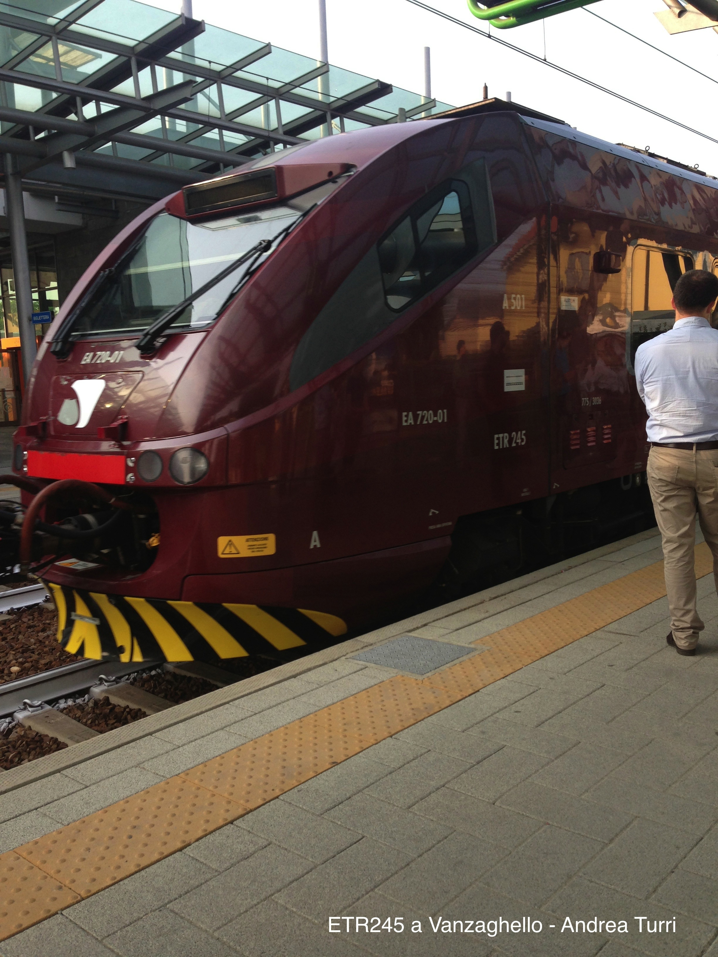 ETR245 CSA Trenord in arrivo alla stazione di Vanzaghello